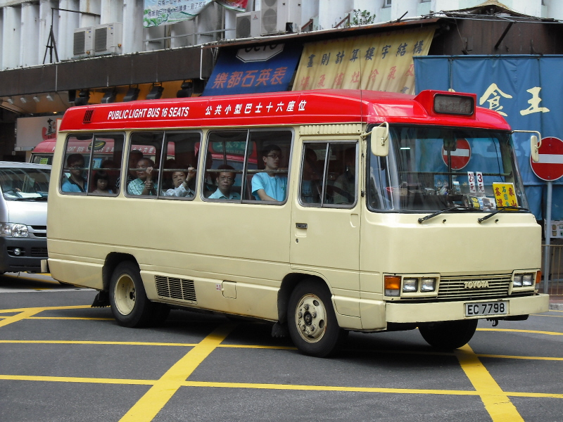 攝於香港荃灣眾安街的一輛1980年代豐田小巴，是採用較小的目的地顯示器，俗稱「細牌箱」